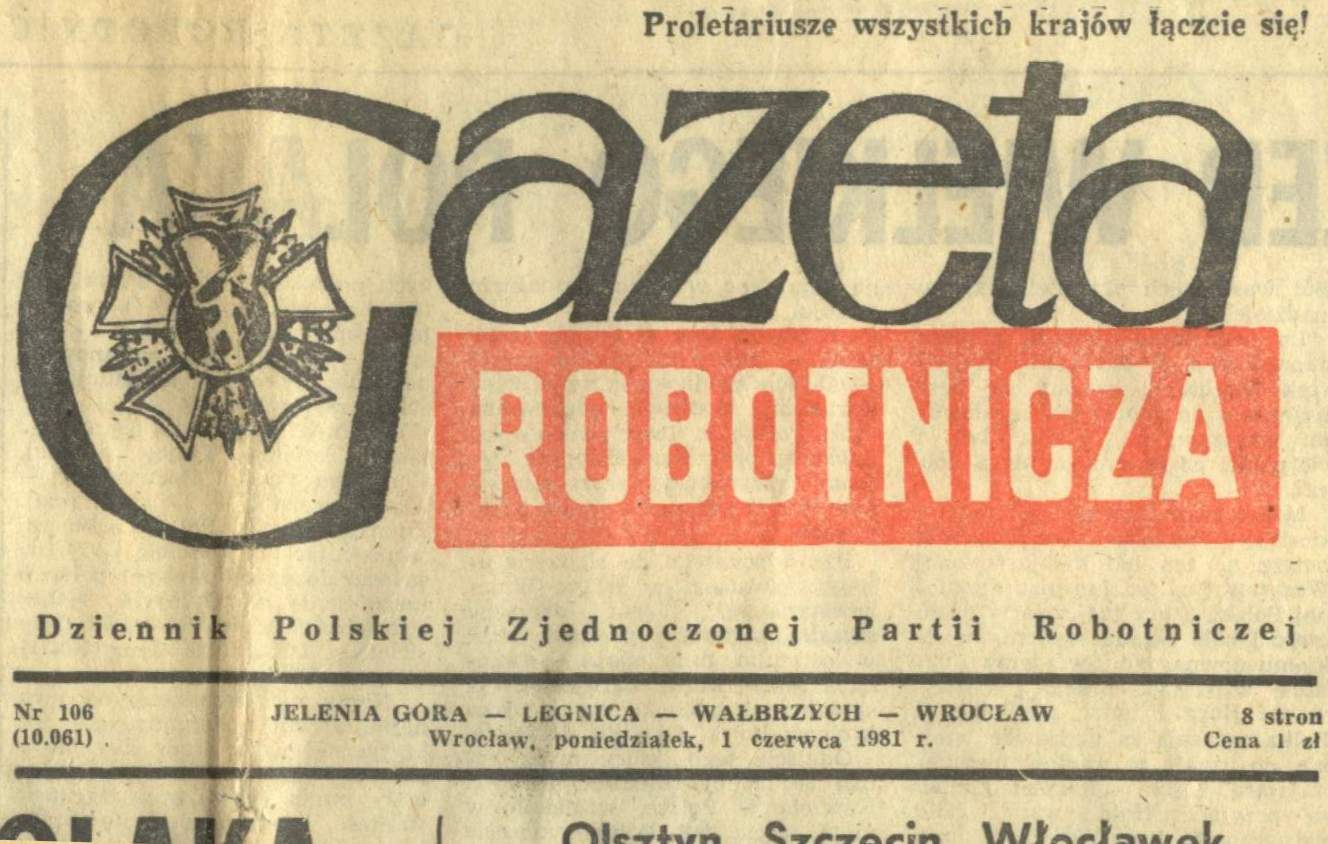 Gazeta Robotnicza, wydanie z 1981 roku